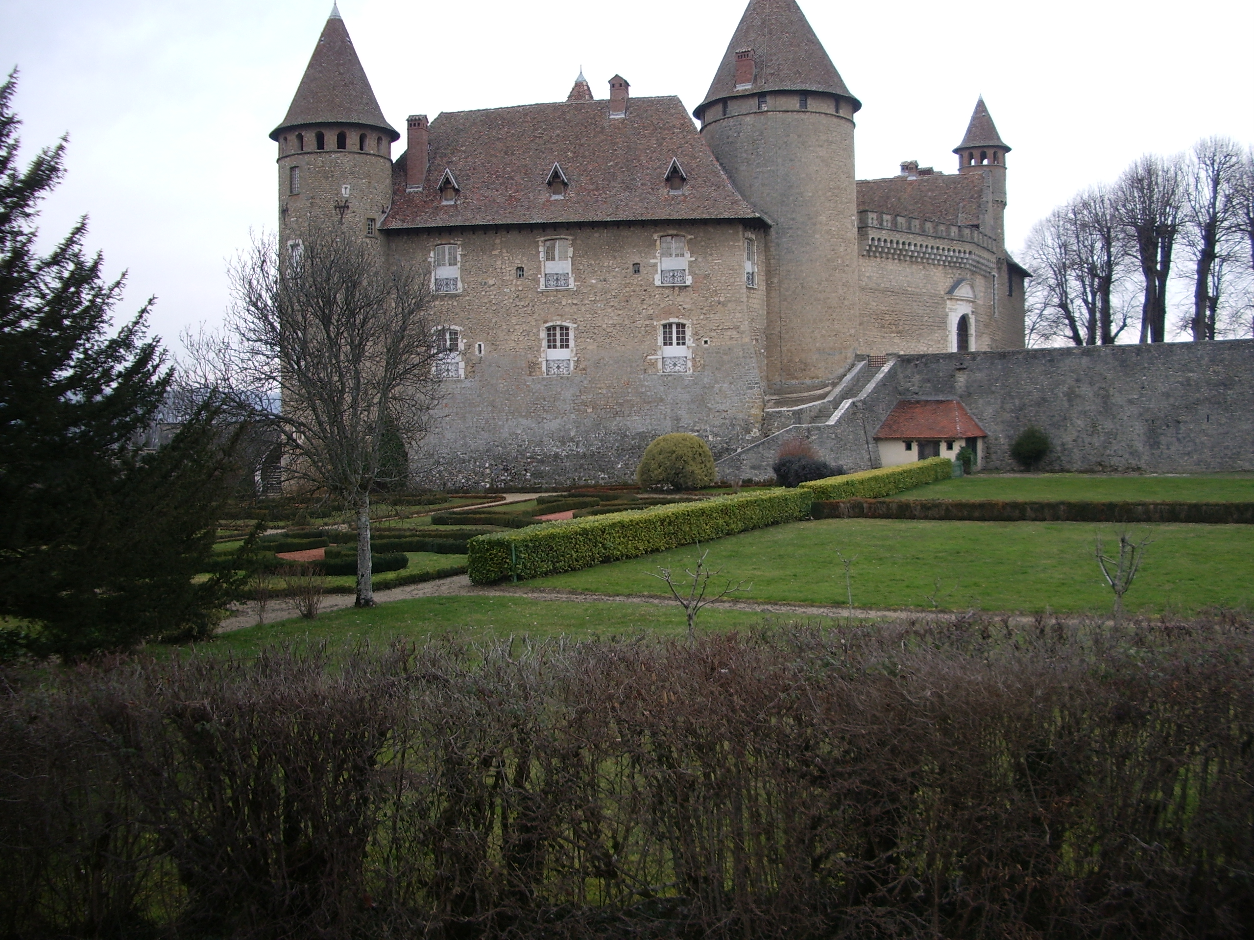 Château de Virieu en Isère (France)